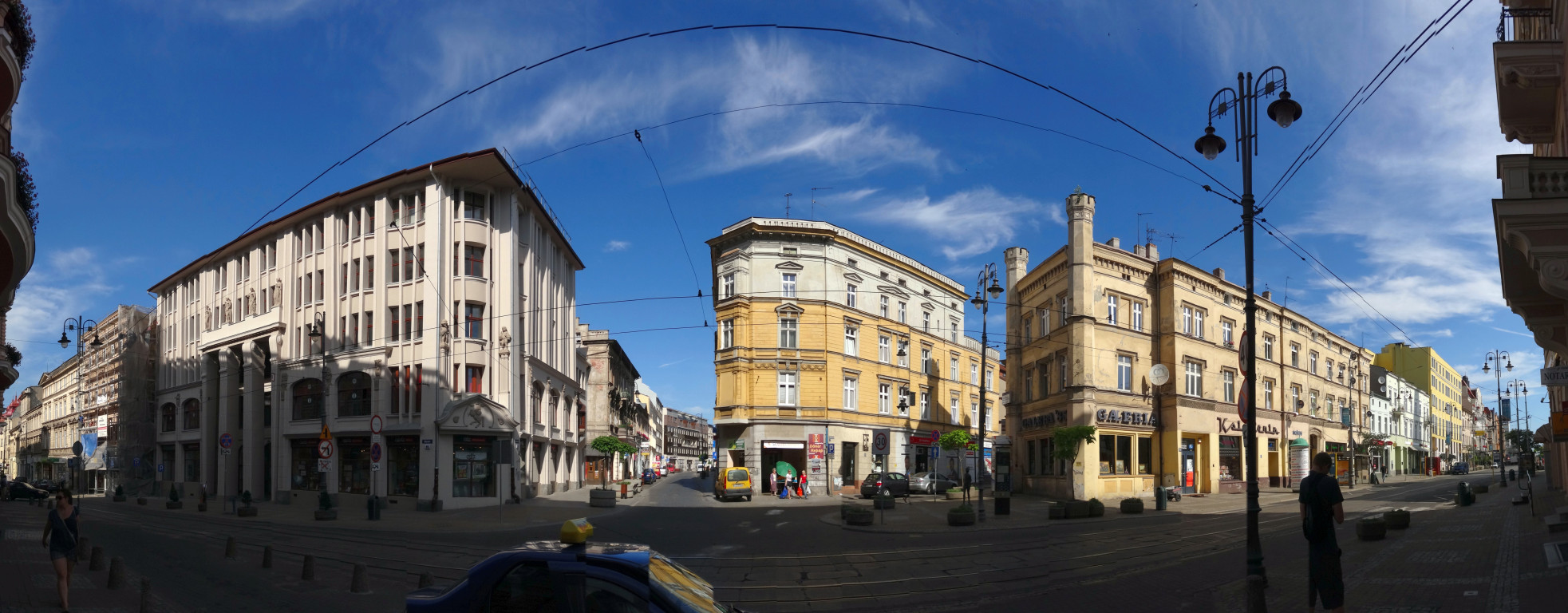 Ulica Gdańska w Bydgoszczy